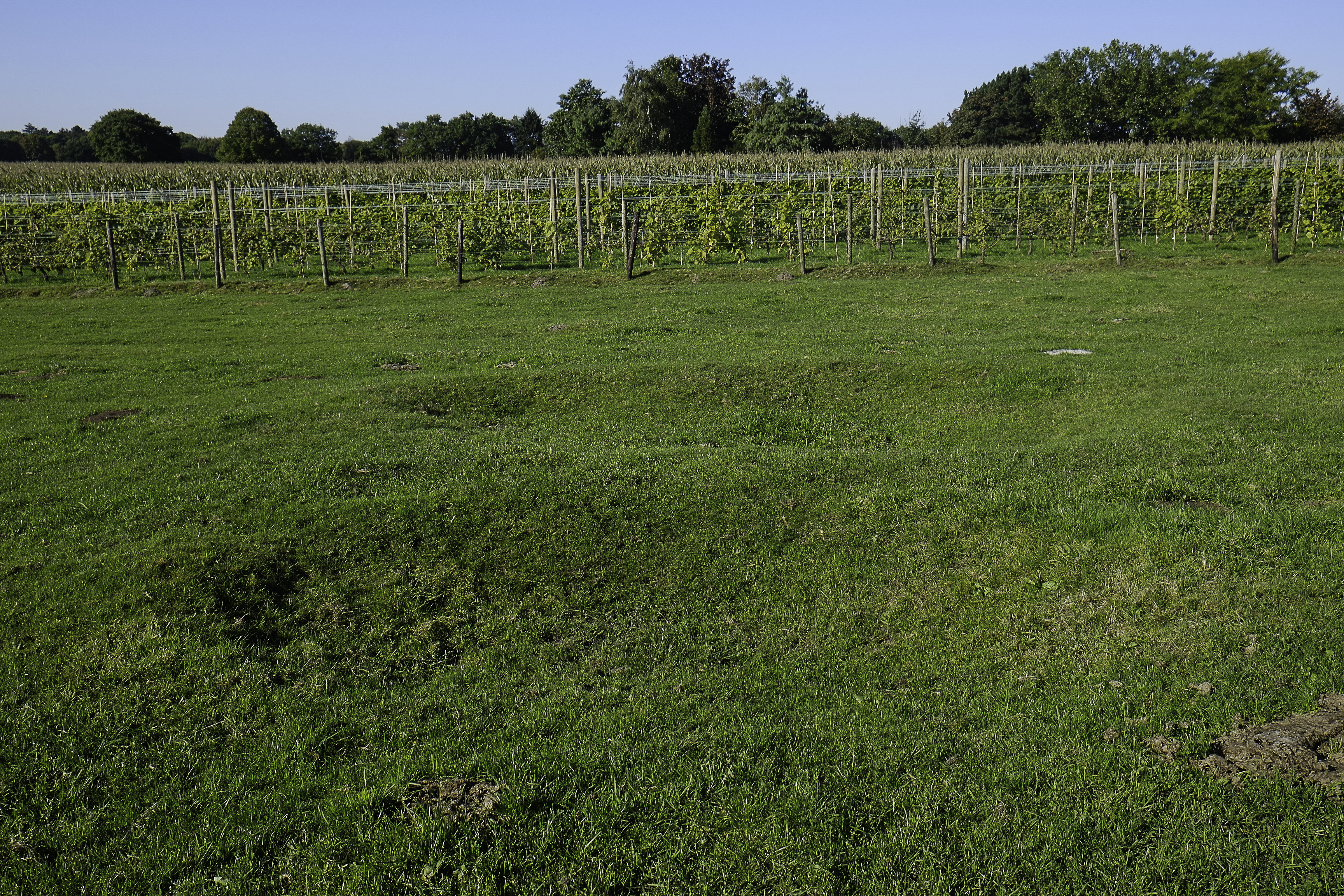 Restanten van Hunebed G3